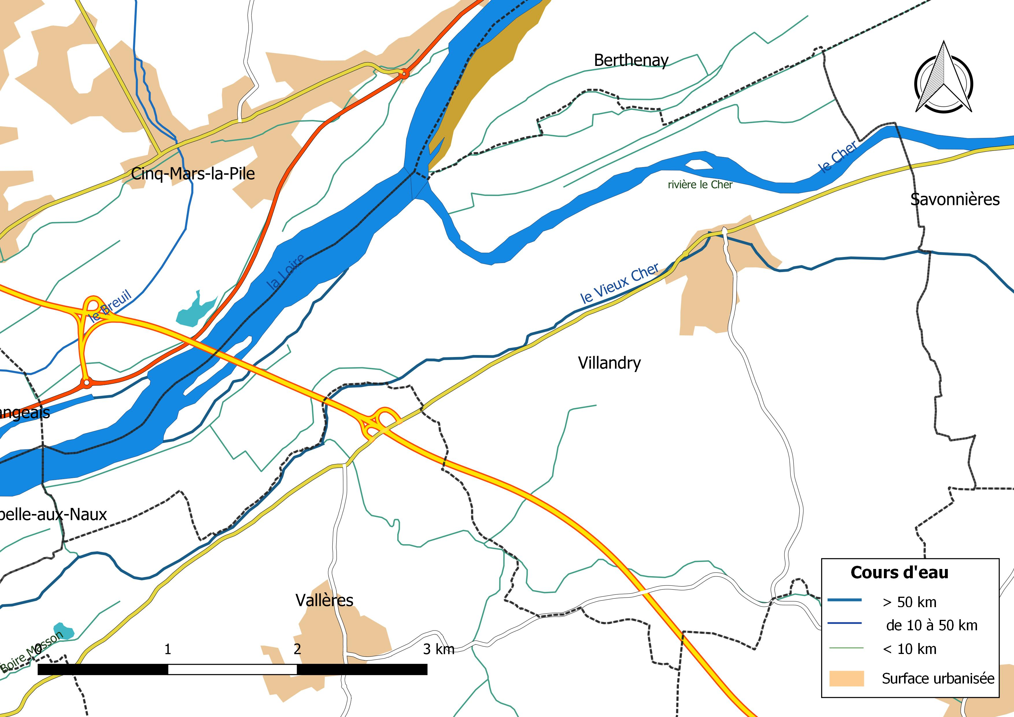 Carte du réseau hydrographique de la commune de Villandry (France).